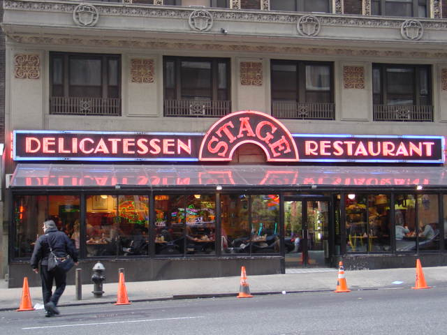 StageDeli